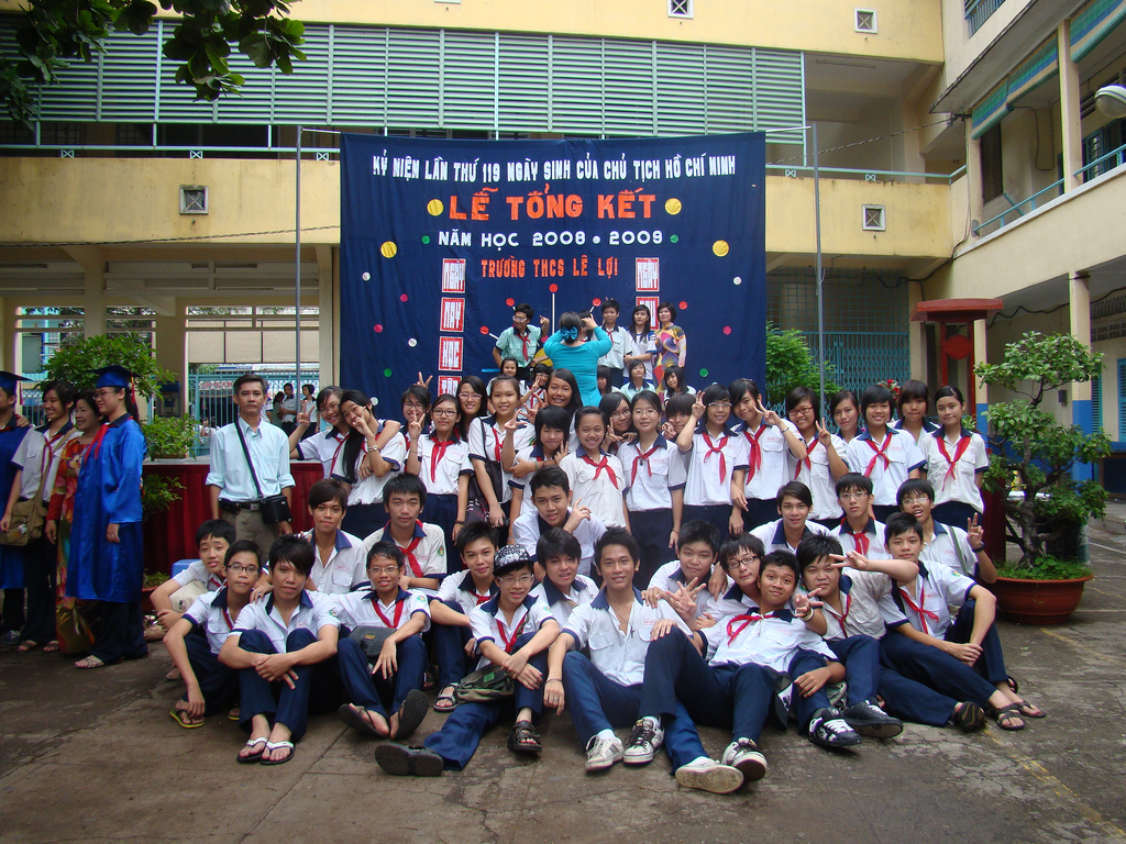 Class 9a5 le loi school.